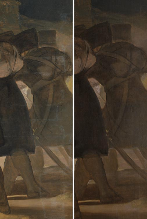 Detalle de la restauración de El tres de mayo de 1808 en Madrid (2008).